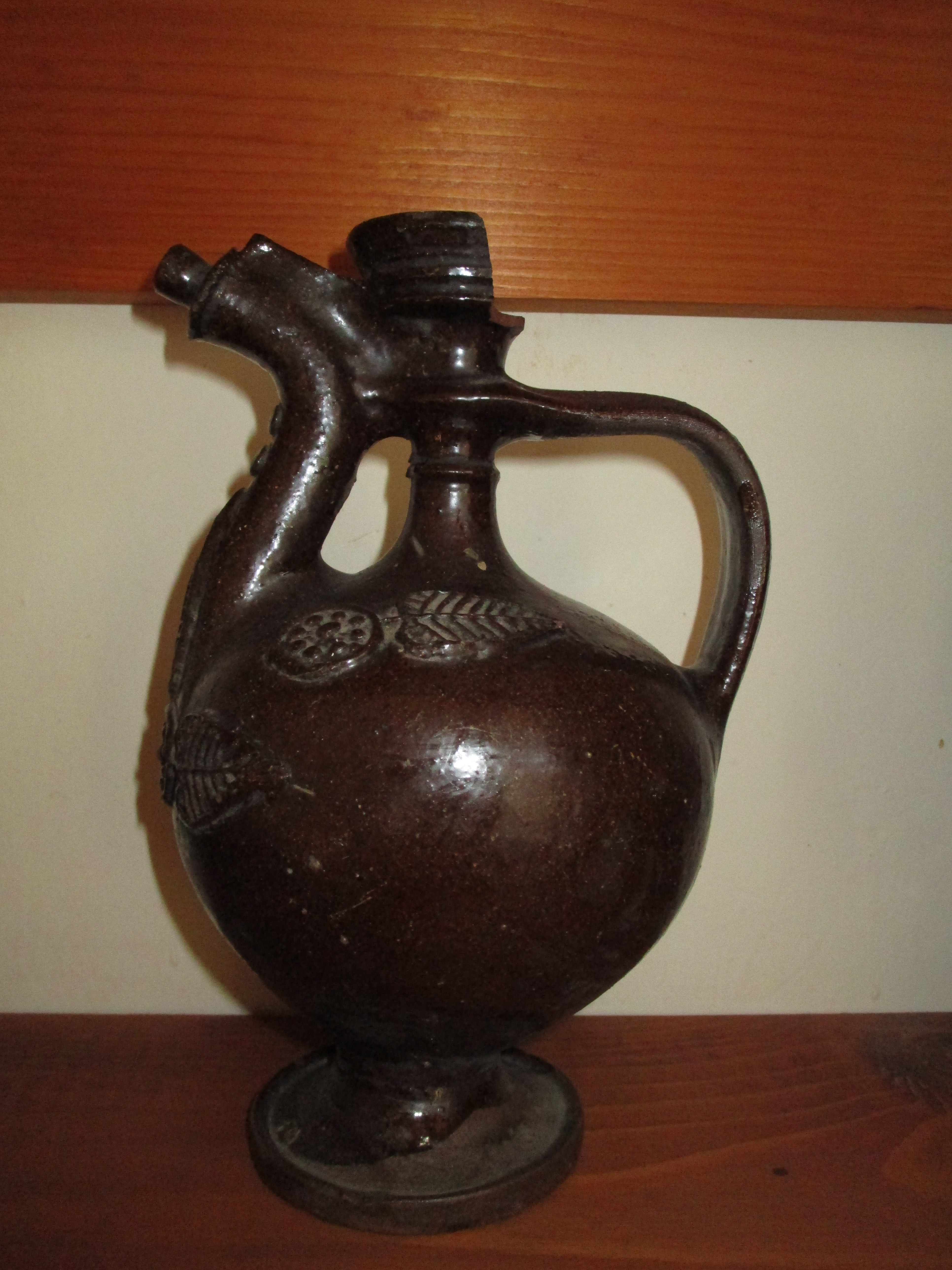 Српски (ћирилица): Завичајна музејска збирка у Димитровграду.